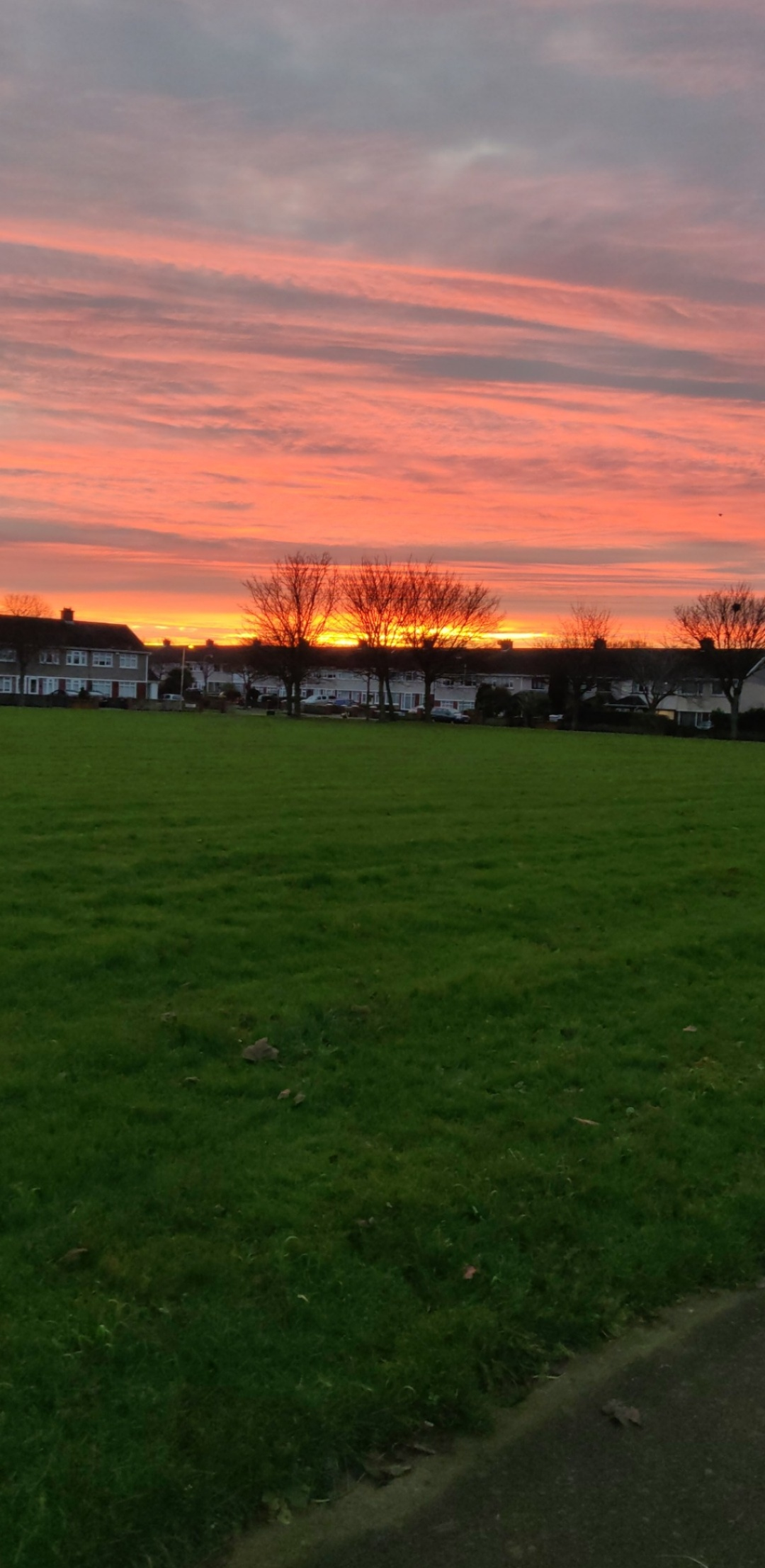 Príomh páirc ag tús an t-eastát i mBán an Aeir